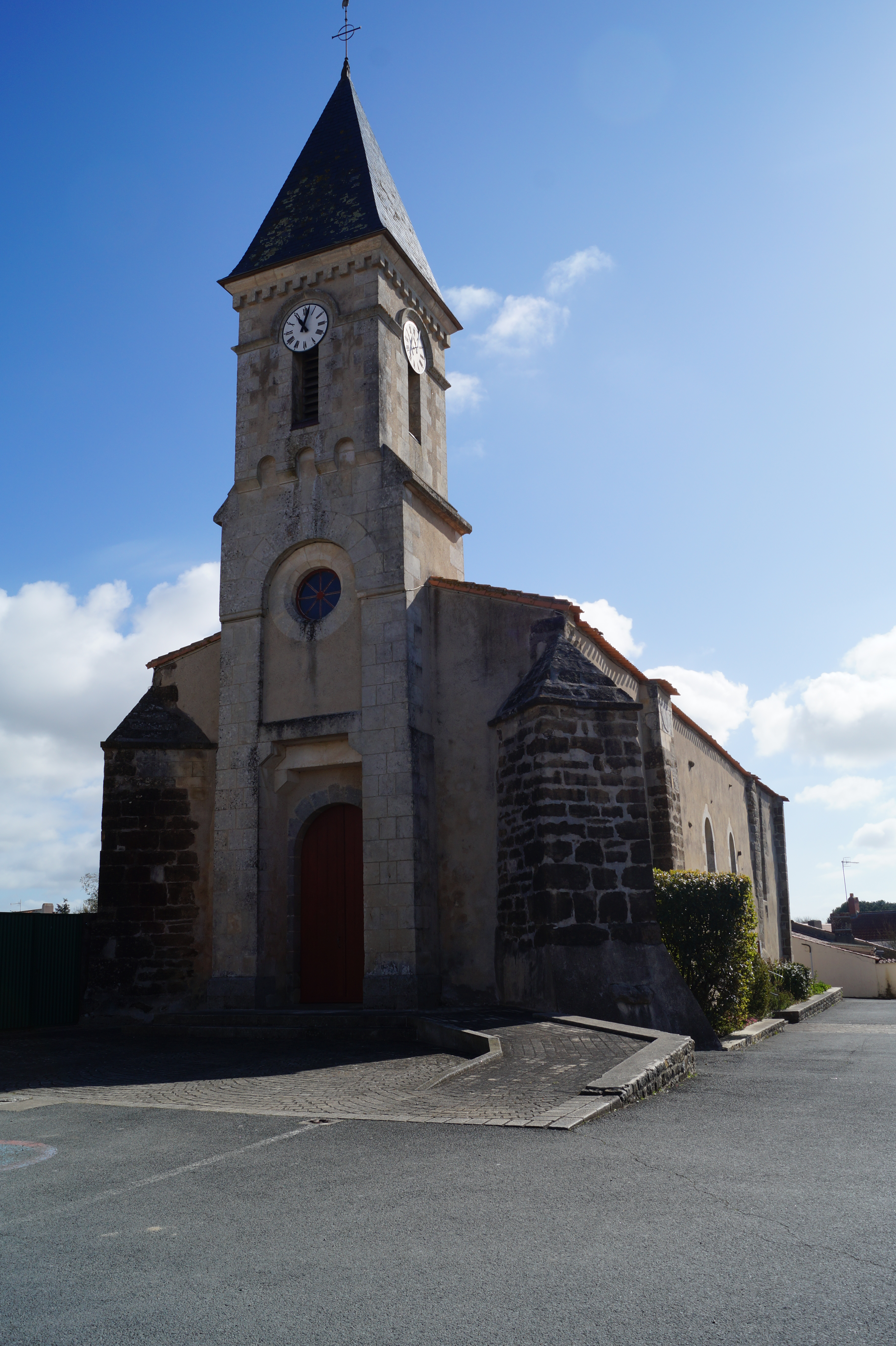 L’église Saint-Hilaire de Saint-Hilaire-la-Forêt depuis la place de l’Église.